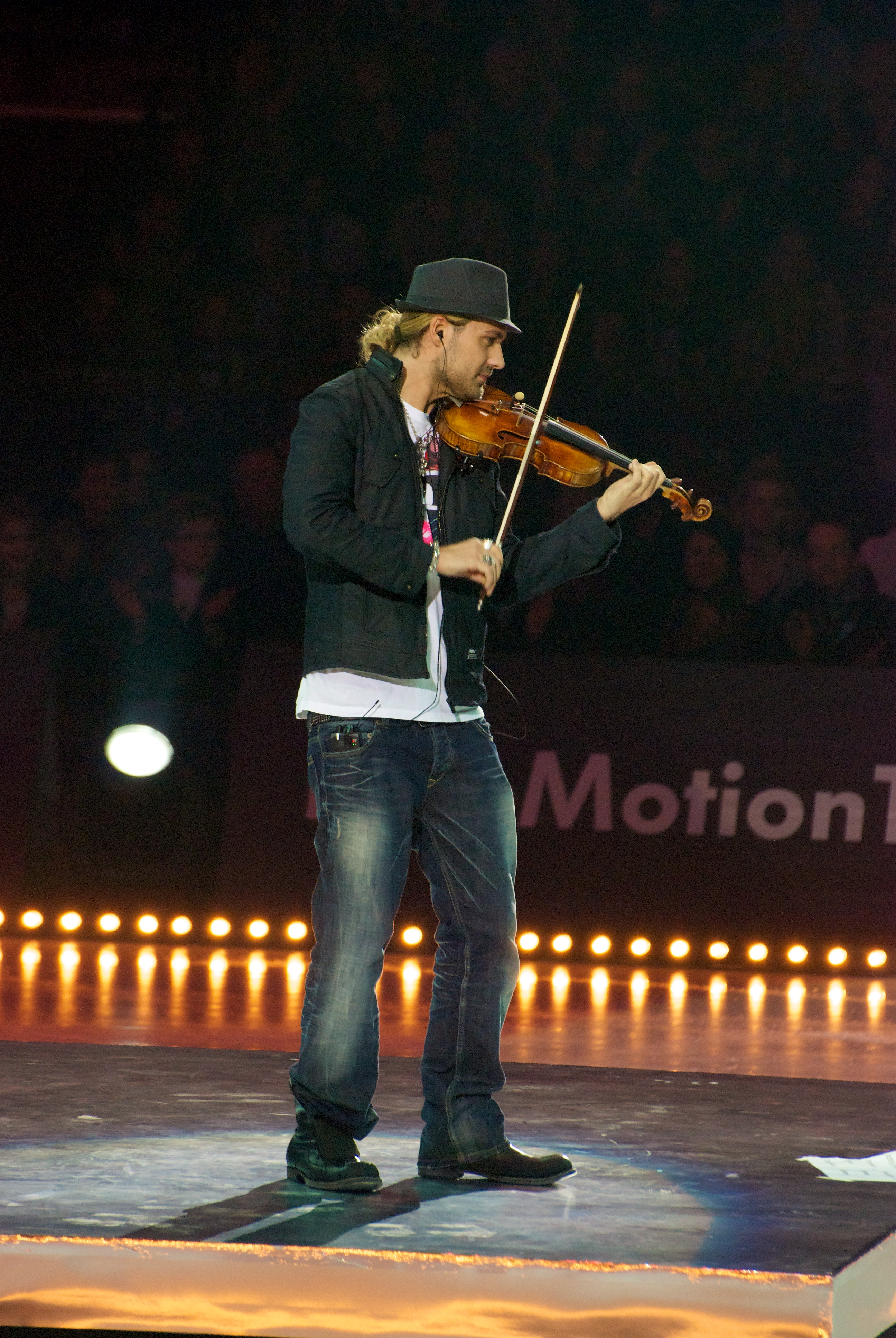 David Garrett on Stage mit seiner Geige